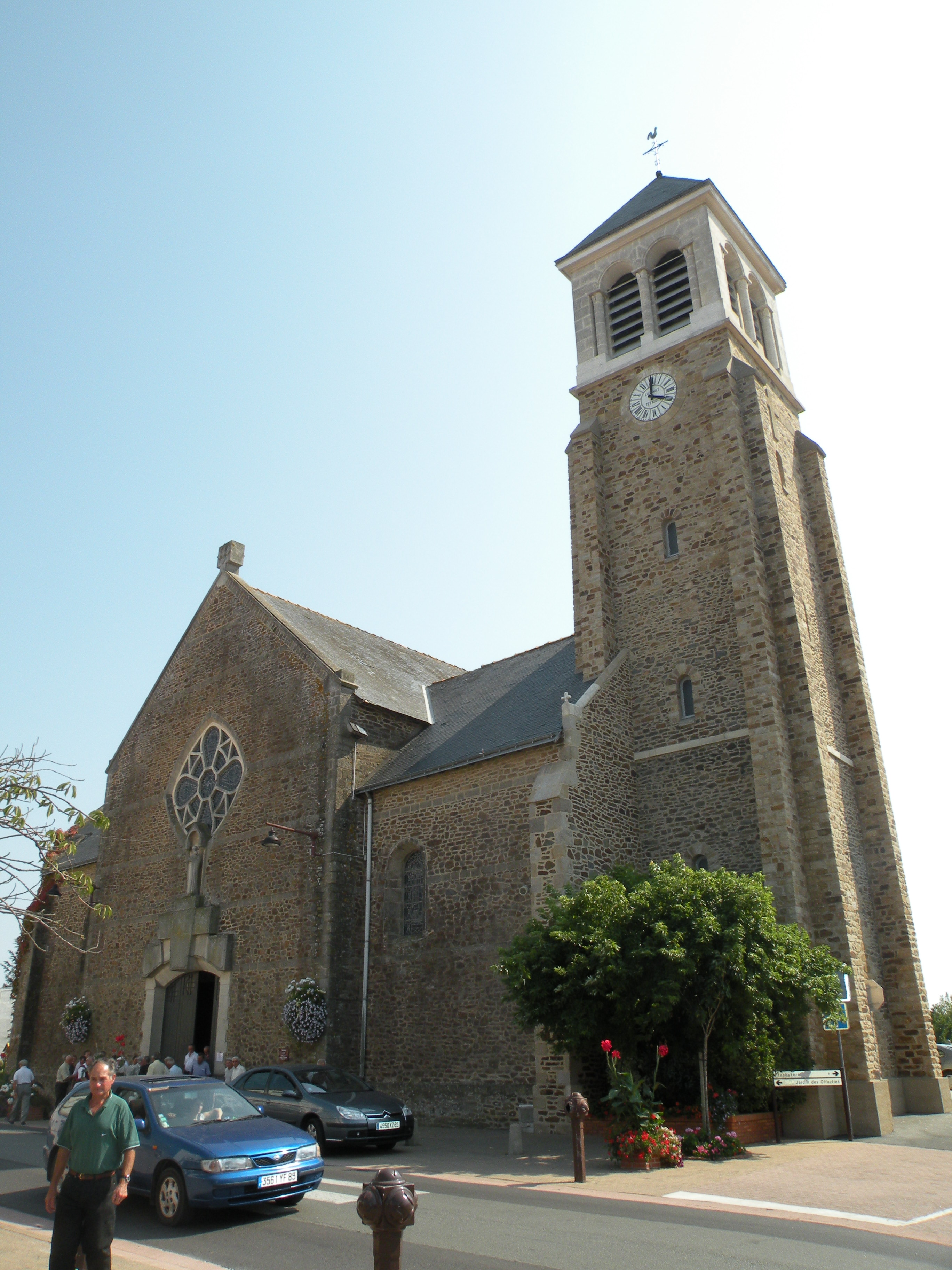 eglise de Coëx, Vendée, france